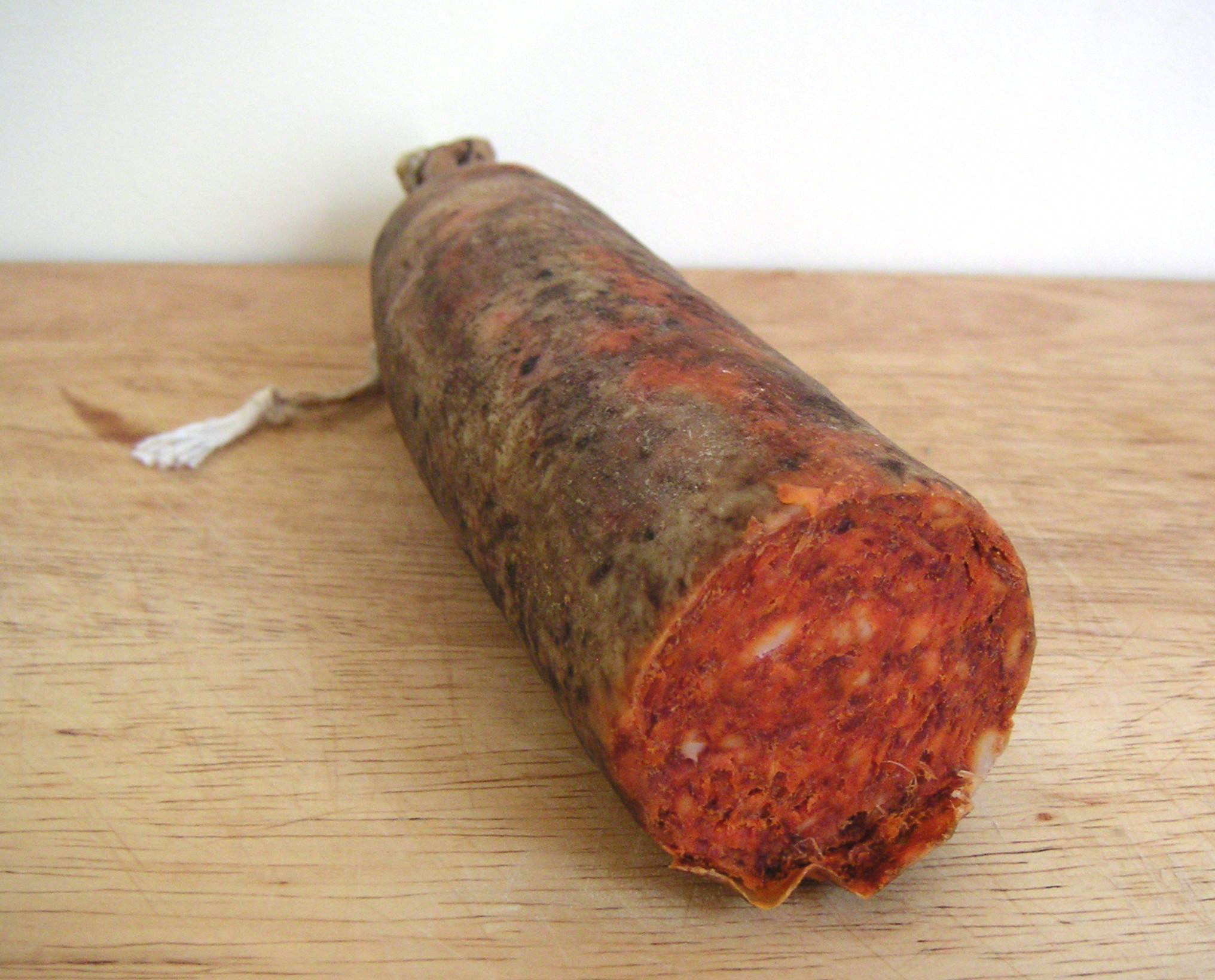 Sobrassada de Menorca. Fixeu-vos que, encara que per fora es vegi marró, l'interior és ben roig a causa del pebre vermell que porta